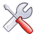 c'est juste l'inverse de Icon tools.svg